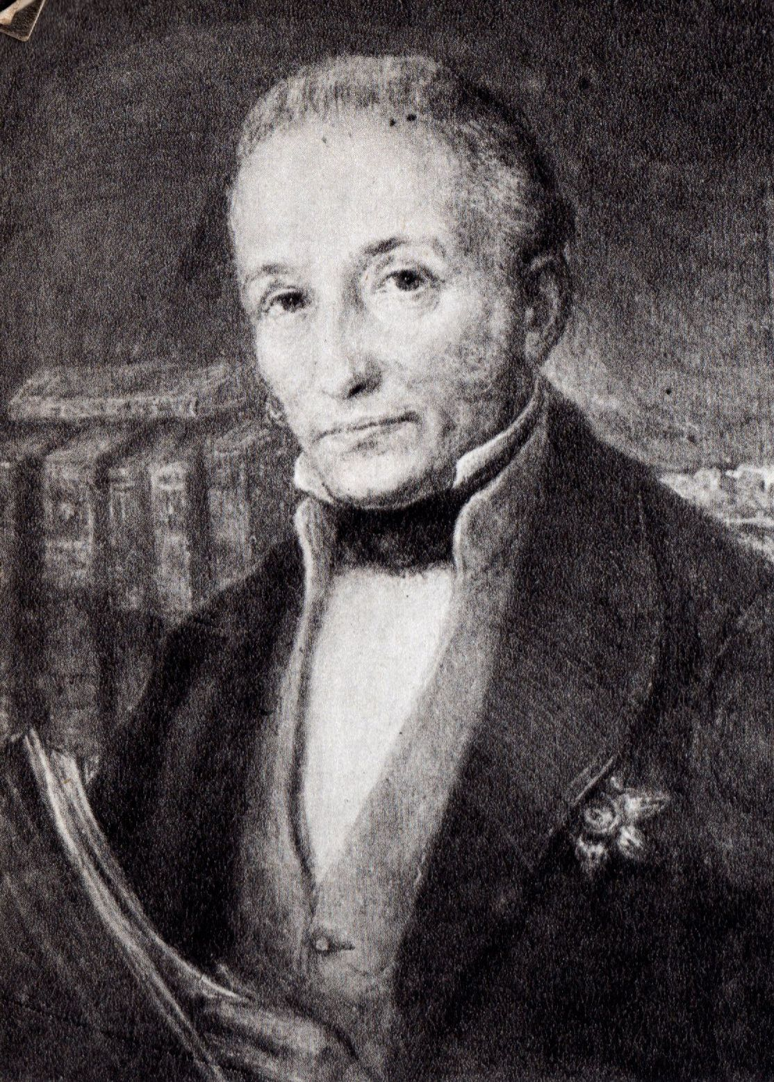 Wincenty Wiszniewski, polski astronom